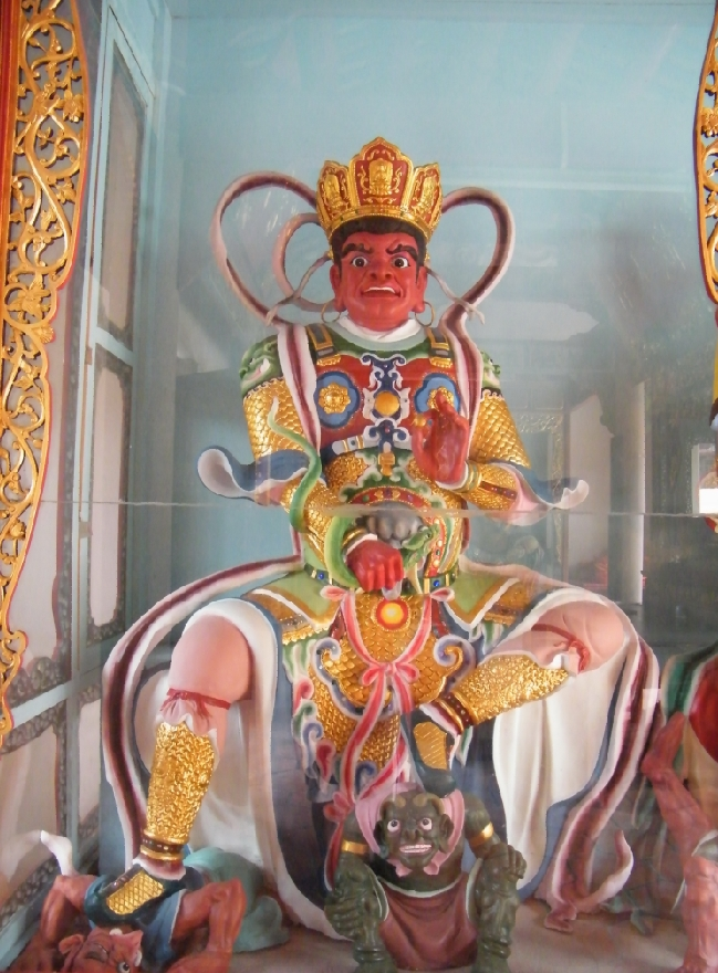 汕头 达濠 青云禅寺 西方广目天王像